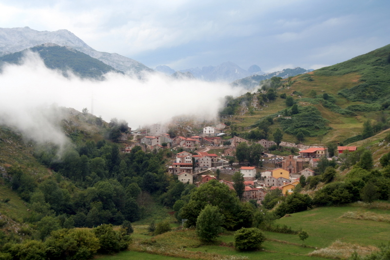 Vista de la localidad de Tresviso, en Cantabria (España).